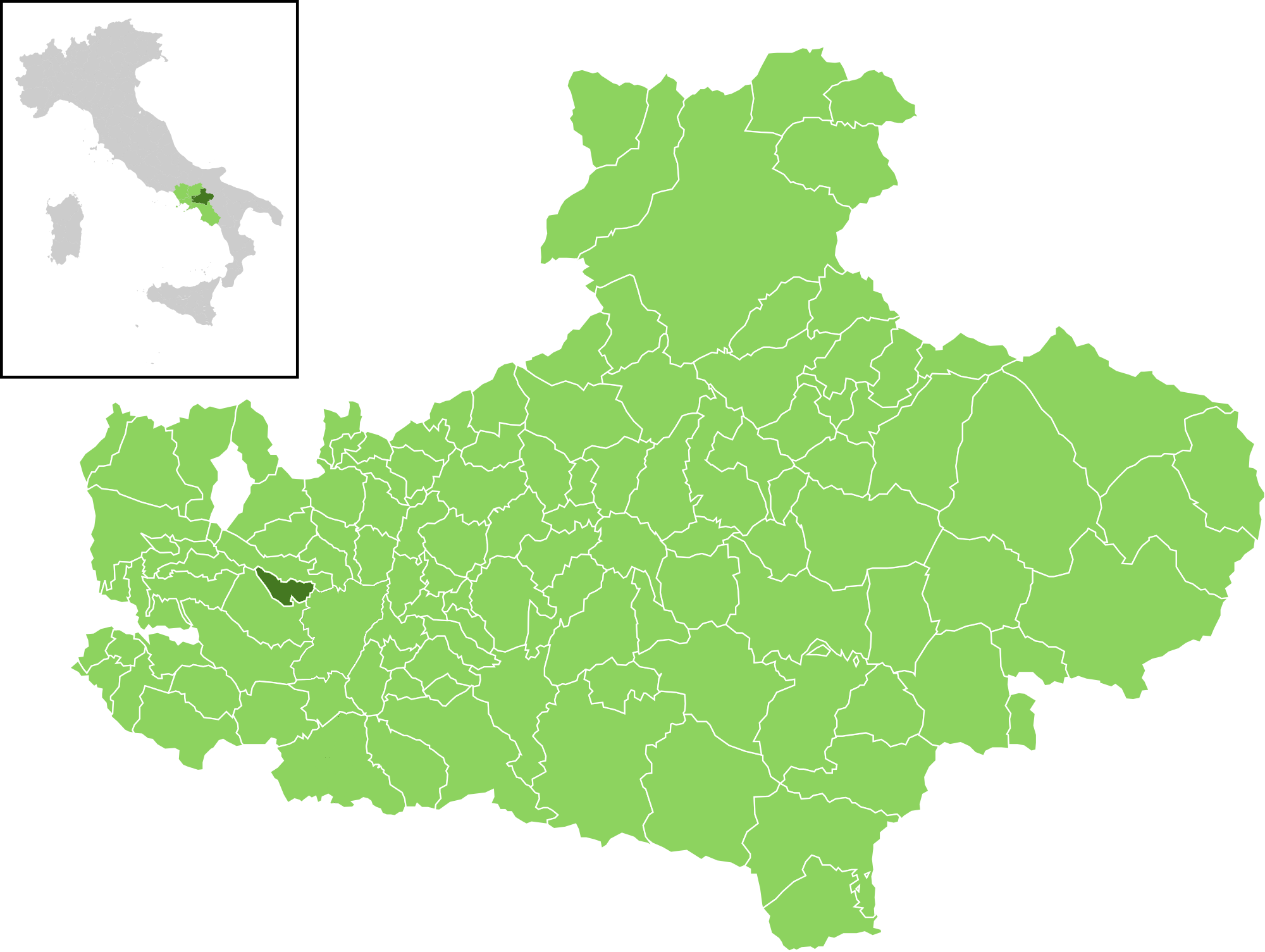 Posizione del comune all'interno della provincia di Avellino